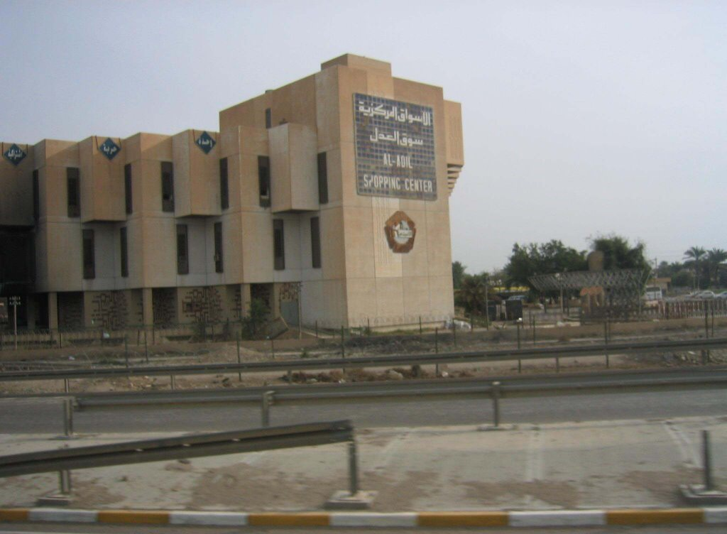 سوق العدل المركزي